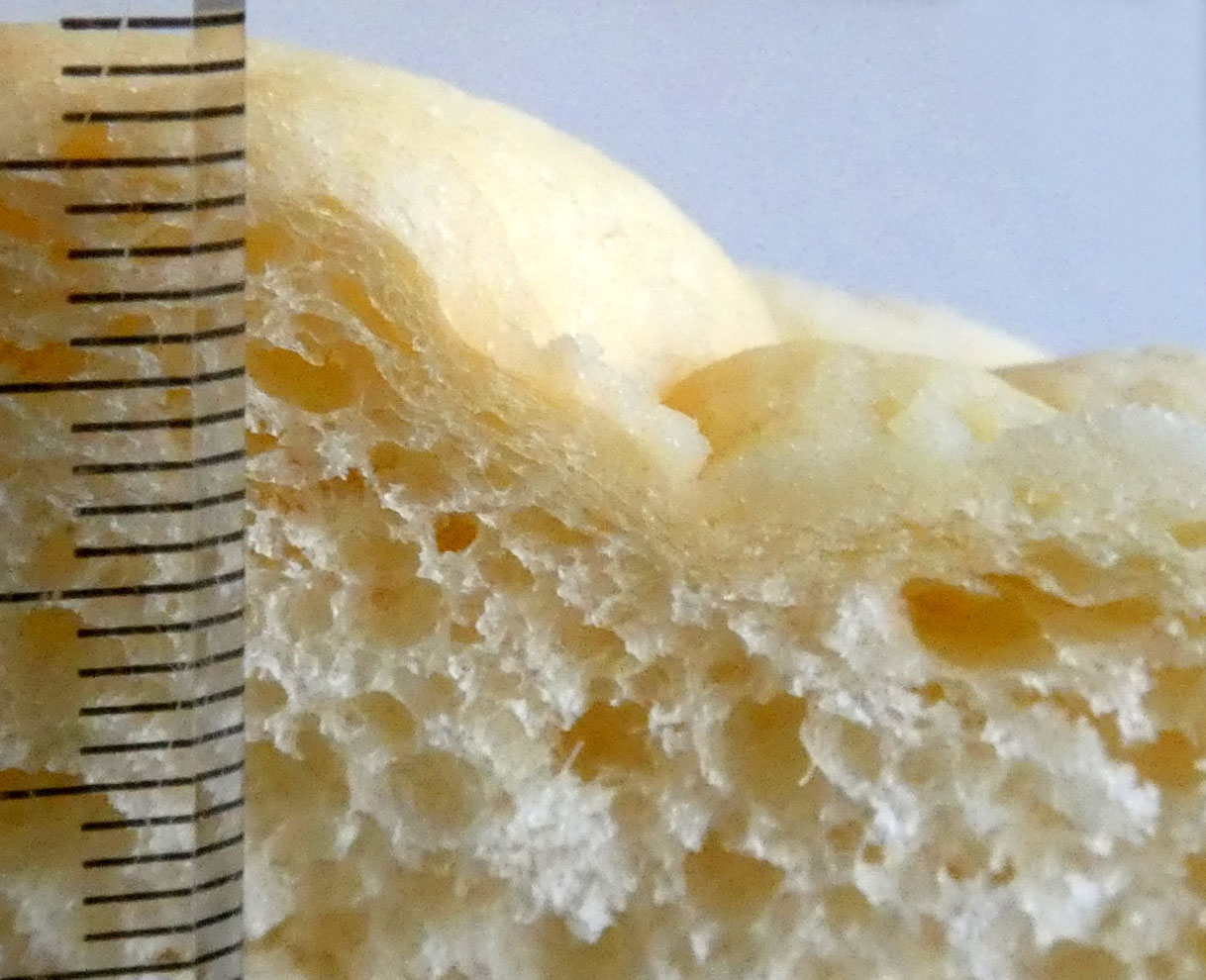 敷島製パンのメロンパンの断面